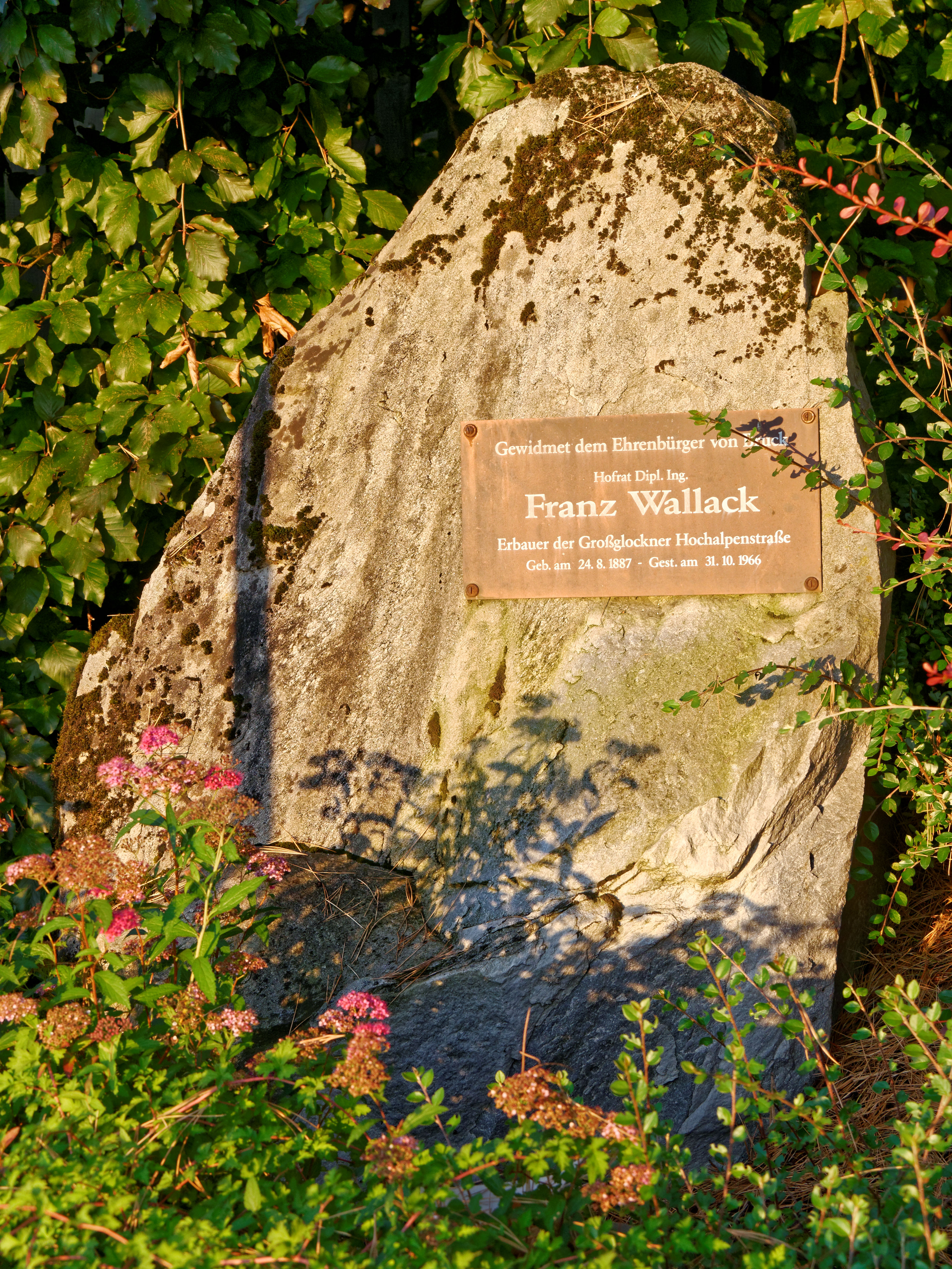 Gedenkstein für Franz Wallack an der Wallackstraße in Bruck an der Großglocknerstraße